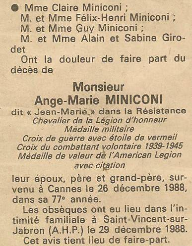 Archive familiale détenue par Paul Miniconi (4ième frère d'Ange-Marie Miniconi). Avis de décès paru dans Nice-Matin.